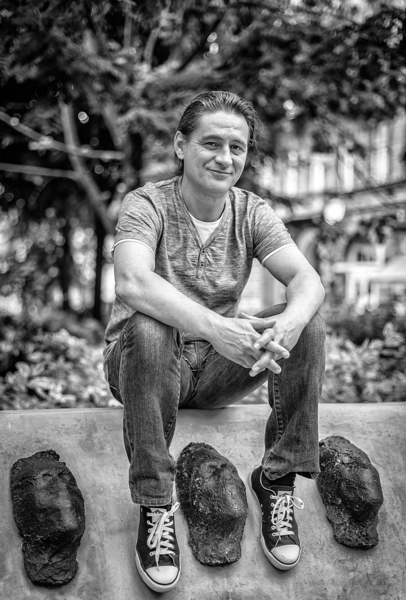 Rancsó Dezső, Hevesi Sándor tér, 2015. június (eredeti képnév: IMG_1442-Edit-2.jpg, on-line